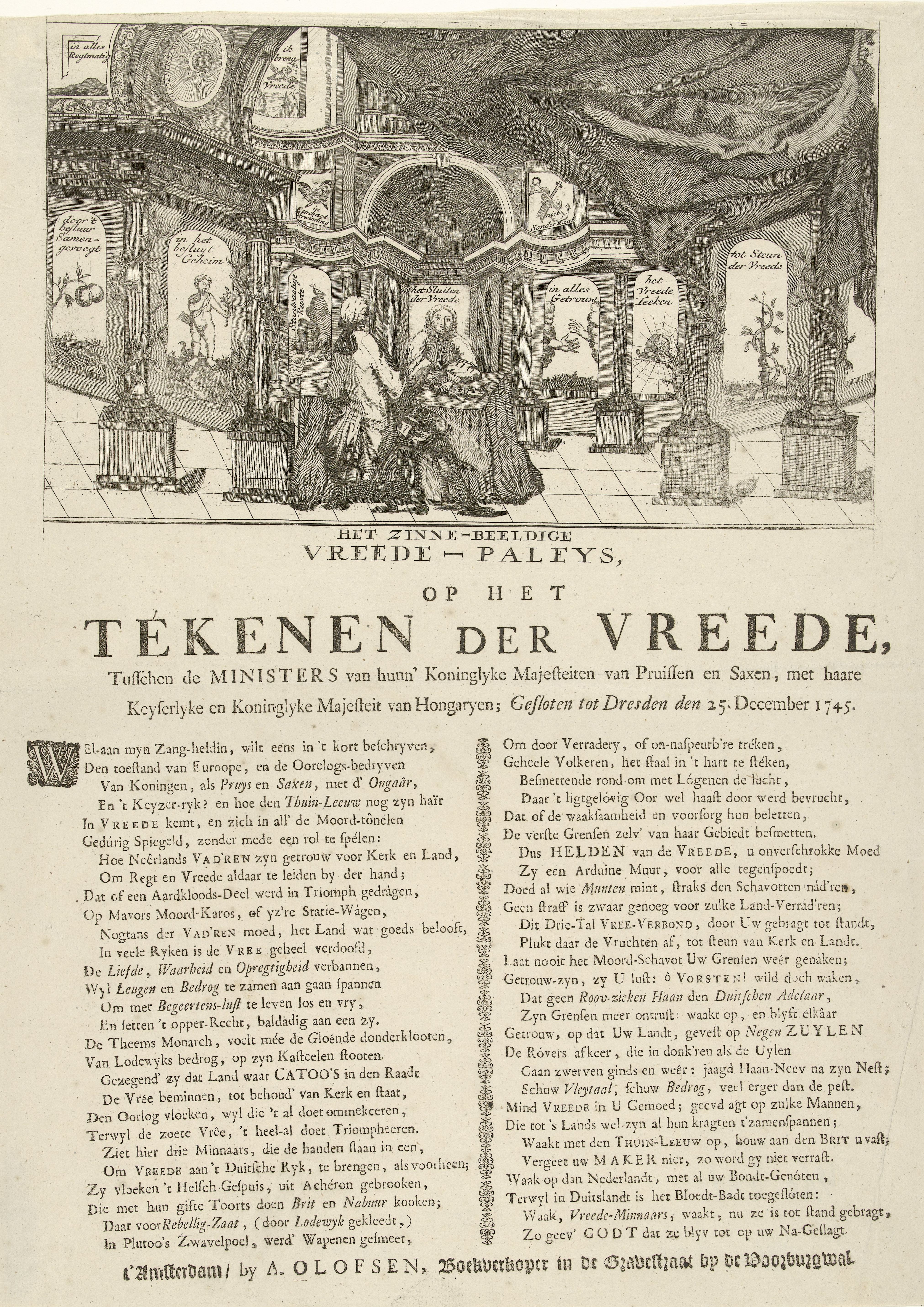 IdentificatieTitel(s): Allegorie op de Vrede van Dresden, 1745Het Zinne-beeldige Vreede-paleys, op het Tekenen der Vreede, Tusschen de Ministers van hunn' Koninglyke Majesteiten van Pruissen en Saxen, met haare Keyserlyke Majesteit van Hongaryen; Gesloten tot Dresden den 25. December 1745 (titel op object)Objecttype: prent Objectnummer: RP-P-OB-83.851Catalogusreferentie: FMH 3852-AOpschriften / Merken: verzamelaarsmerk, verso, gestempeld: Lugt 2228Omschrijving: Allegorie op de Vrede van Dresden gesloten op 25 december 1745 tussen Oostenrijk enerzijds en Pruisen en Saksen anderzijds. Interieur van een paleis Waar: in twee mannen gezeten aan een tafel het vredesverdrag tekenen. In de bogen tussen zuilen staan allerlei emblemen en symbolen van de vrede, rechtsboven een opgetrokken gordijn. Op het blad onder de plaat een vers op de vrede in twee kolommen.VervaardigingVervaardiger: prentmaker: anoniemuitgever: Arnoldus Olofsen (vermeld op object)Plaats vervaardiging: prentmaker: Noordelijke Nederlandenuitgever: AmsterdamDatering: 1745 - 1746Fysieke kenmerken: ets met tekst in boekdrukMateriaal: papier Techniek: etsen / boekdrukAfmetingen: blad: h 475 mm × b 343 mmOnderwerpWat: signing of peace treaty, concluding the peaceVrede van Dresden (1745)Wanneer: 1745-12-25 - 1745-12-25WaarDresdenVerwerving en rechtenVerwerving: aankoop 1881Copyright: Publiek domein